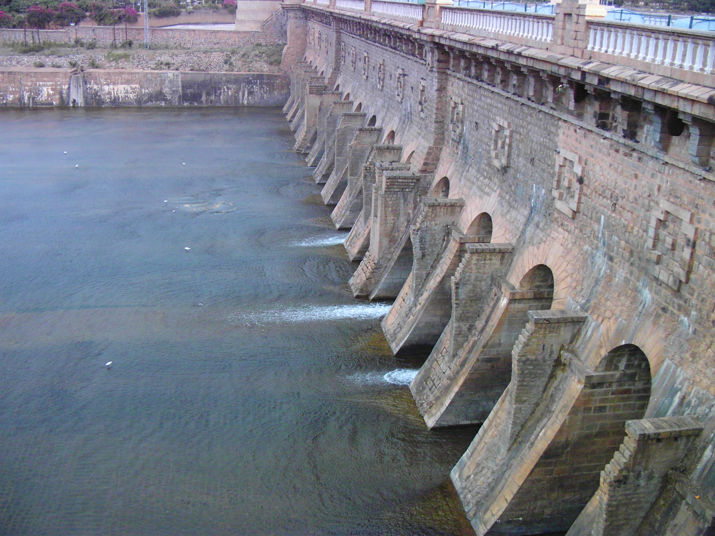 The Krishna Raja Sagara dam beside the Brindavan gardens in Karnataka, India.